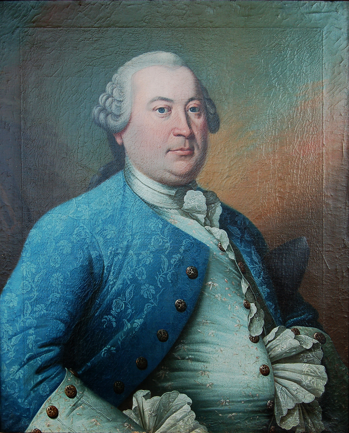 Hans Ulrich Mølmann (1715–1778), Trondhjem. Hoffagent og forretningsmann. Fikk bygget bypaleet som senere ble kalt «Harmonien» i Torvets sørvestre hjørne, Trondhjem. Det brant i 1942